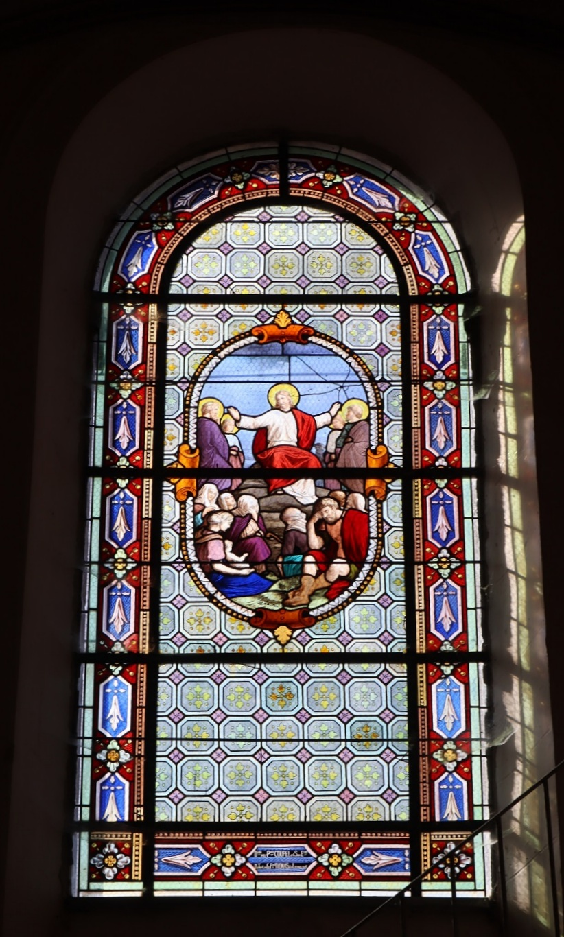 Église Sainte-Anne-sur-Vilaine (35). Intérieur. Baie 14. Le sermon sur la montagne.